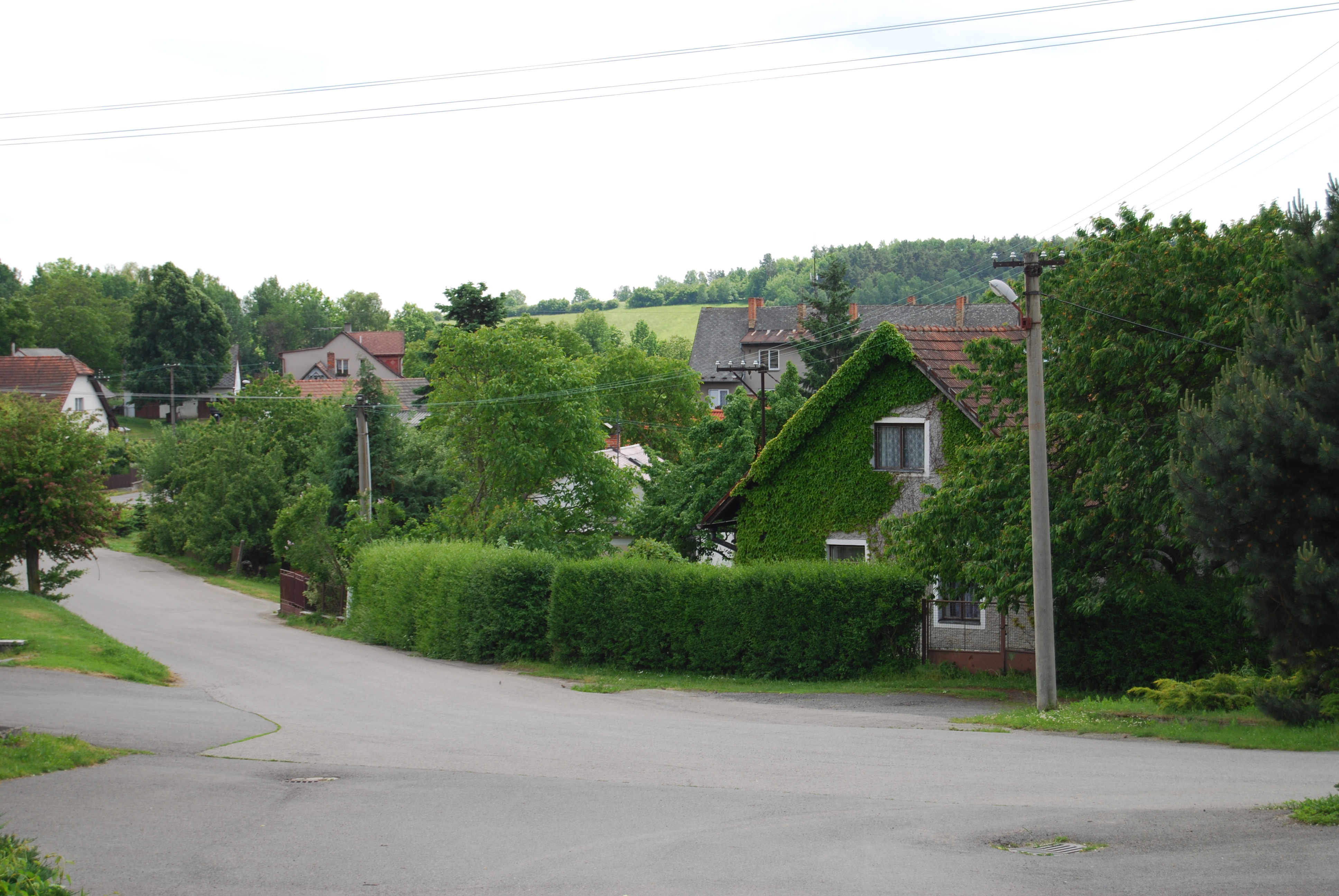 Pohled na část obce. Zhoř je obec ležící v jižních Čechách v okrese Písek. Česká republika.